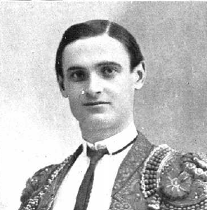 Fotografía del matador de toros español Ricardo Torres Reina «Bombita» publicada con motivo del comienzo de la temporada taurina de 1913 en Madrid